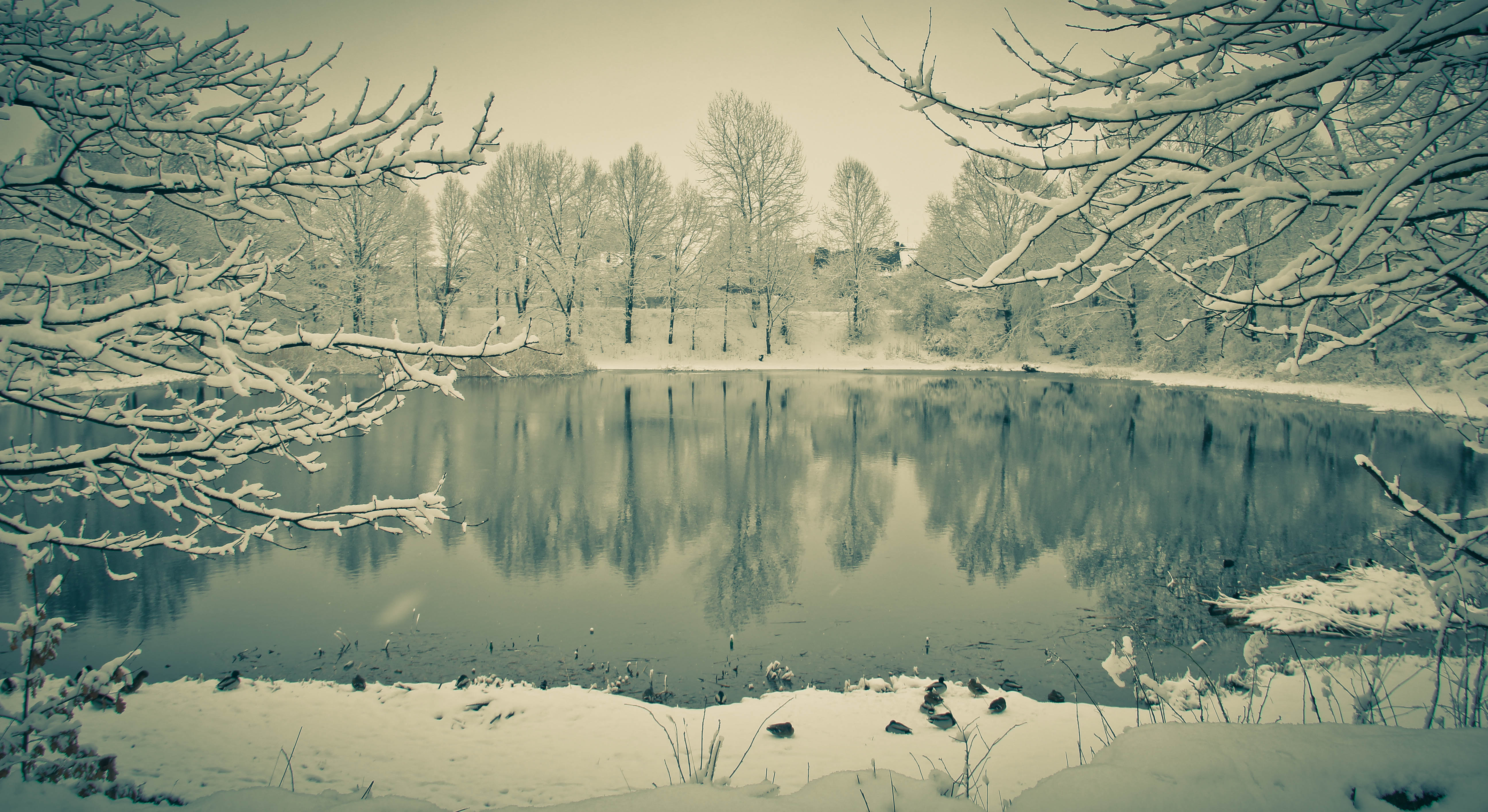 Łabędzi Staw (dawniej Schwanenteich), lub Staw Miejski. Chojnów.